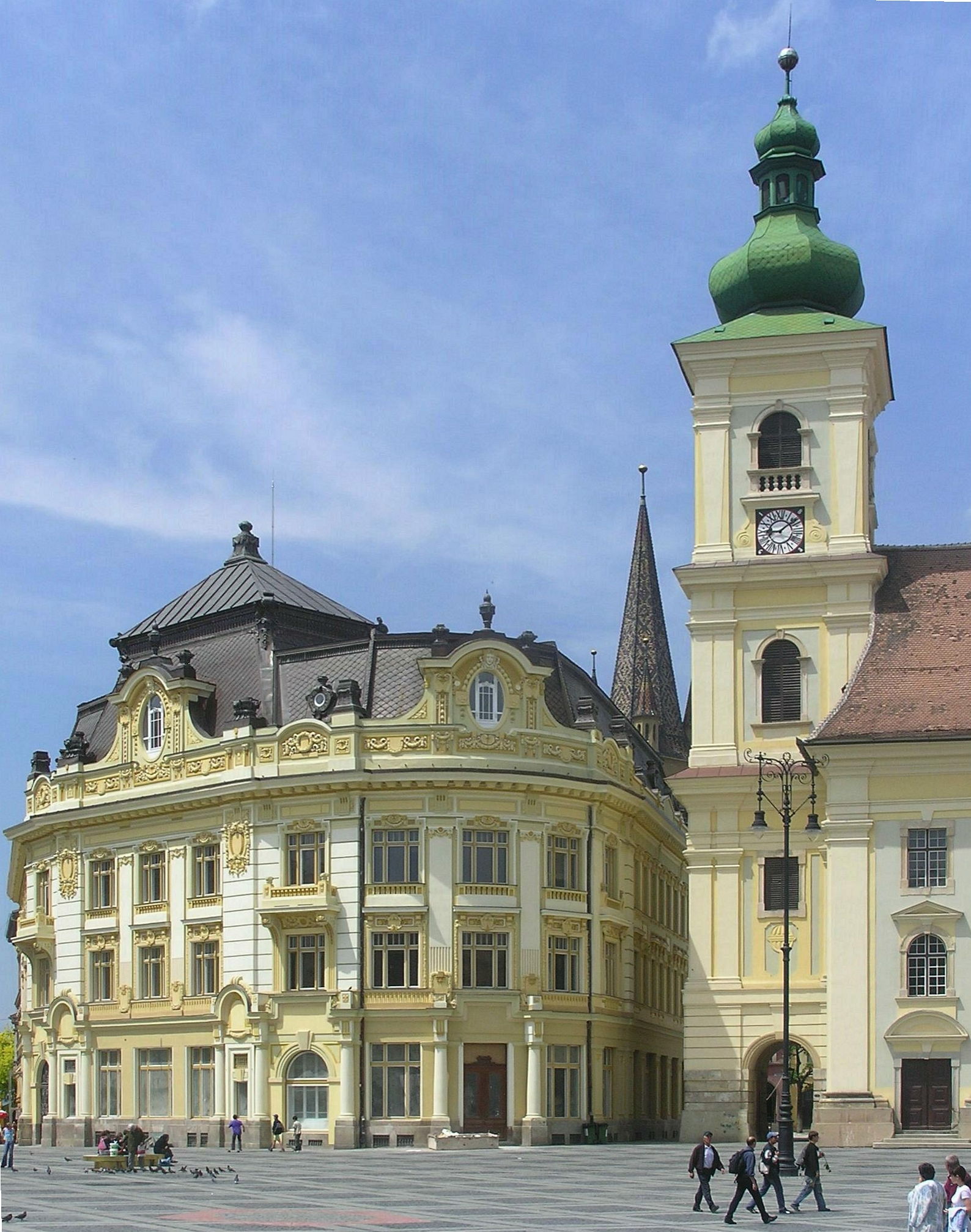 Hermannstadt, Siebenbürgen, Romania